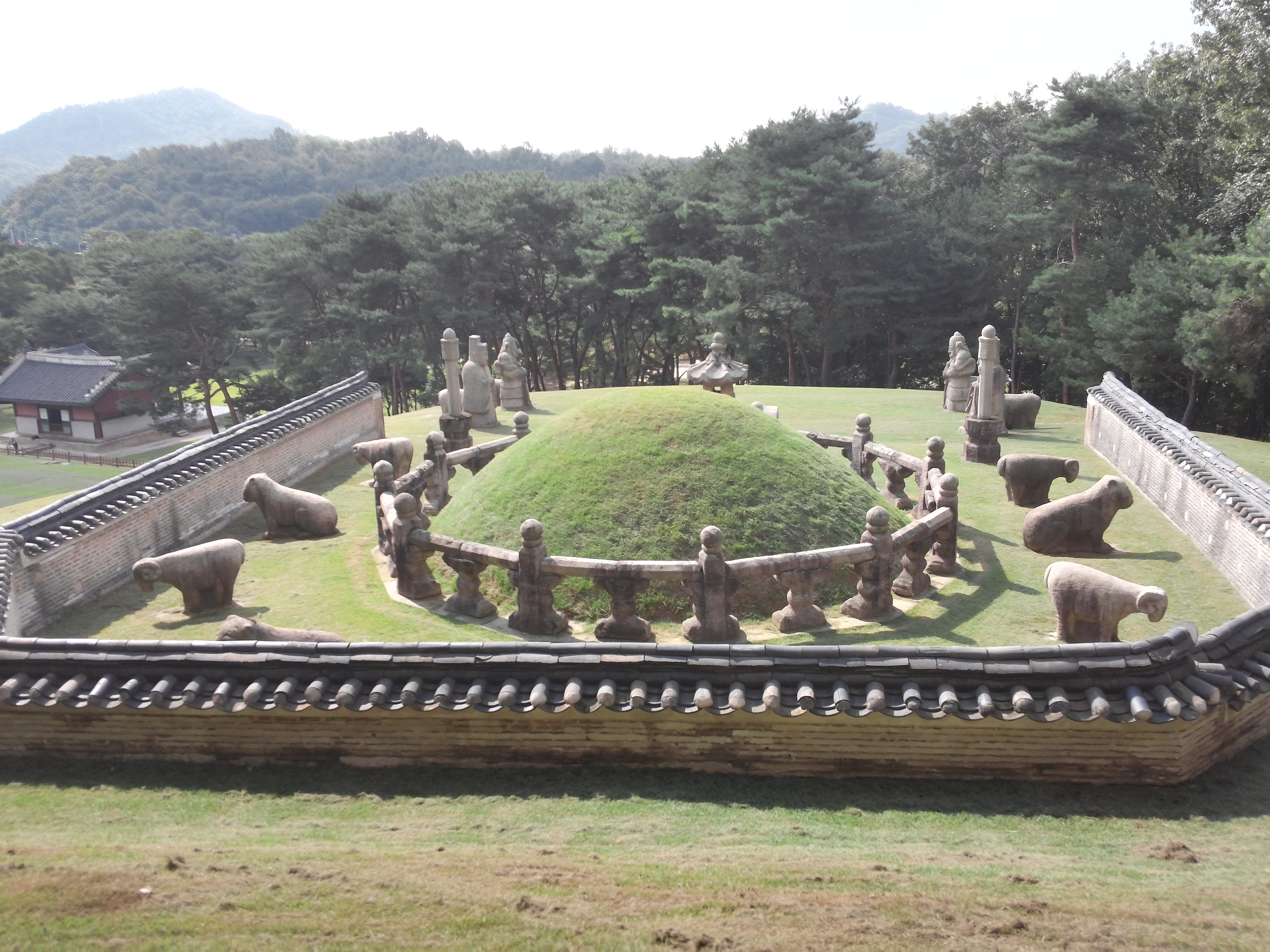 경릉(敬陵) 소혜왕후(인수대비) 봉분 뒤에서 바라본 모습.